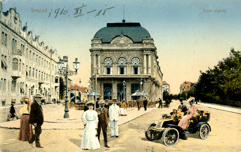 Kass szálloda, kávéház és étterem. Épült 1897-ben Steinhardt Antal tervei alapján.